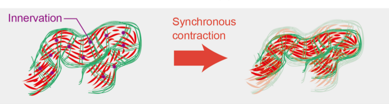 Mioepiteliales longitudinales.